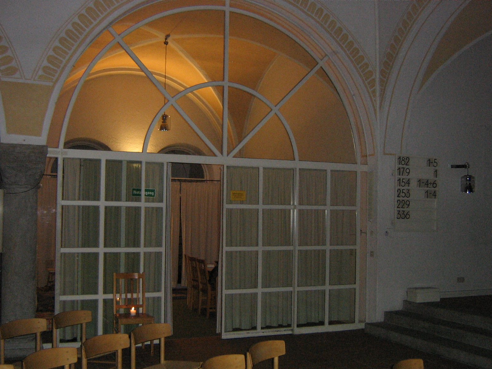 Innenraum der St.Johanneskirche München nach Westen